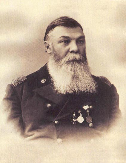 Просветитель чувашского народа Иван Яковлевич Яковлев